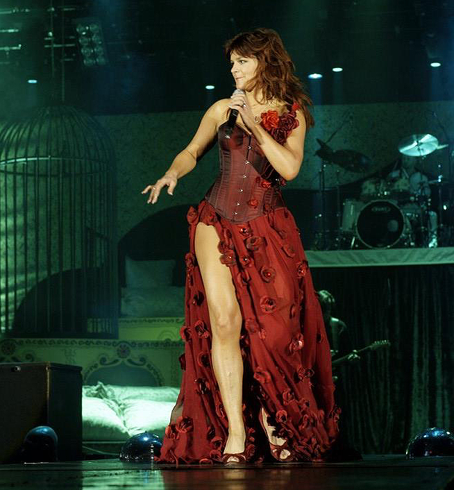 Andrea Berg tijden haar concert in de Koning Pilsener Arena Oberhausen, 26 februari 2011